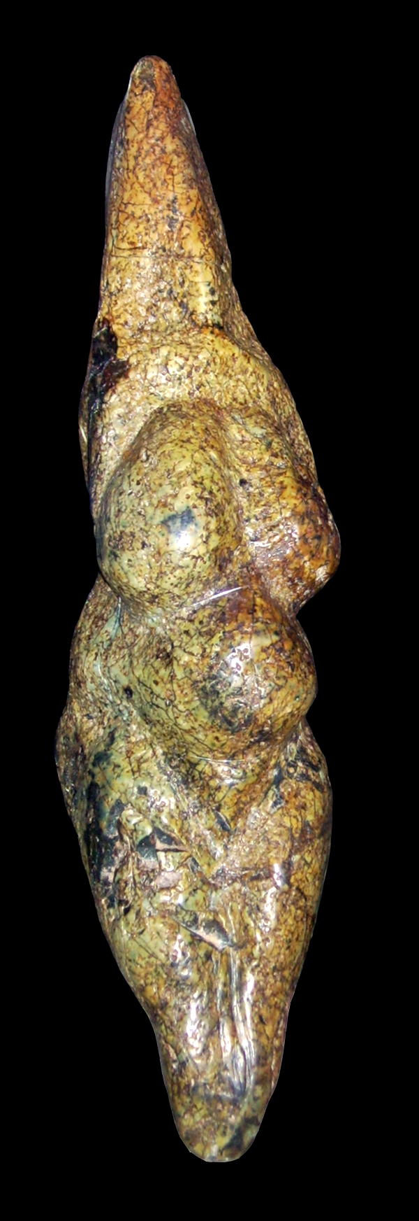 Vénus gravettienne de Savignano (Italie) - photographie personnelle au Musée Pigorini de Rome - Vincent Mourre